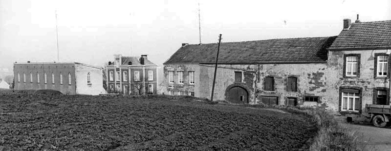 Zicht vanaf de Zonnebergweg naar het oosten op de Ursulinenweg in Sint Pieter (Maastricht). Links: de Villa Maaszicht, het buitengoed van de zusters Ursulinen van de Romeinse Unie. Links daarvan de kloosterkapel.